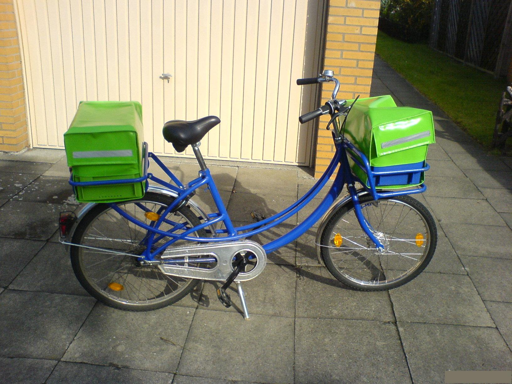 Zustellfahrrad der CITIPOST GmbH Hannover. Hier Fimierte diese noch als PIN Mail Hannover GmbH, die Räder sind auch nach der Umfimierung gleich geblieben.